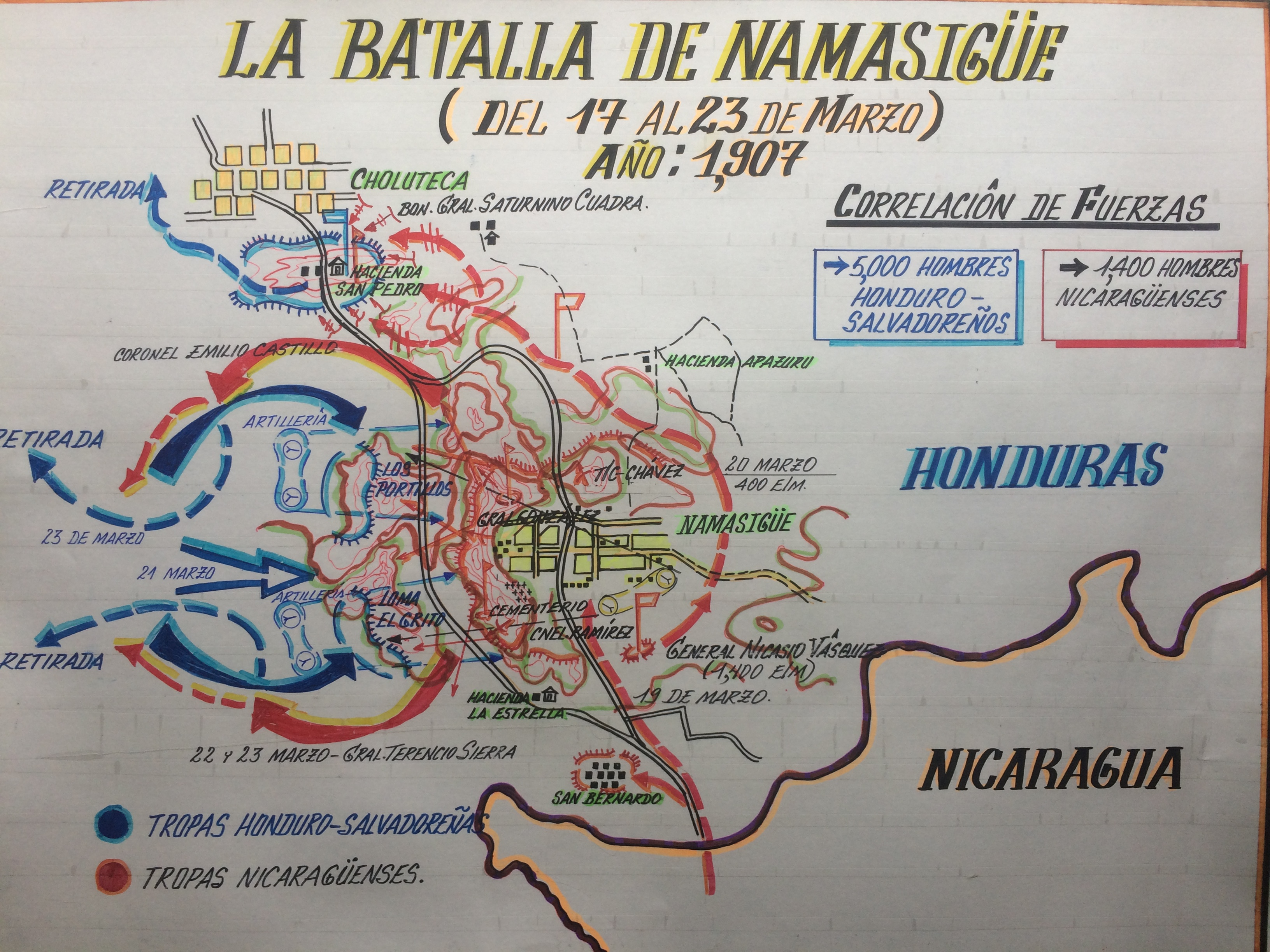 Batalla decisiva de la guerra impuesta a Nicaragua por Honduras y El Salvador